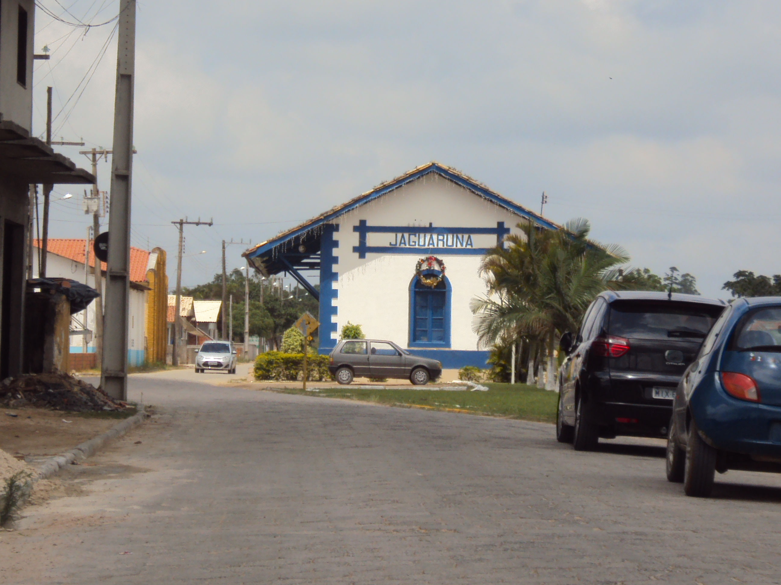 Estação Ferroviária da Estrada de Ferro Donna Thereza Cristina, em Jaguaruna, SC, Brasil